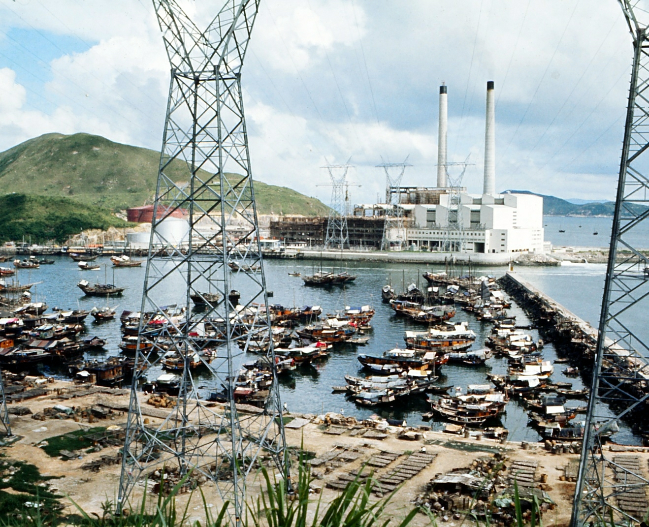 Ap Lei Chau Power Station